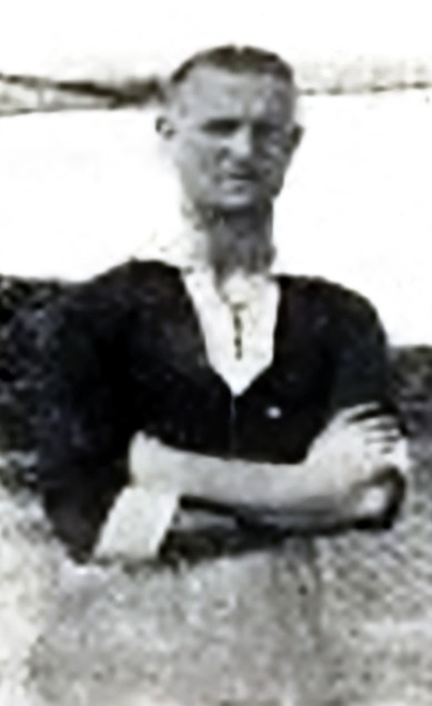 Józef Stogowski piłkarz TKS Toruń i Polonia Warszawa oraz hokeista TKS Toruń, Legia Warszawa, AZS Poznań